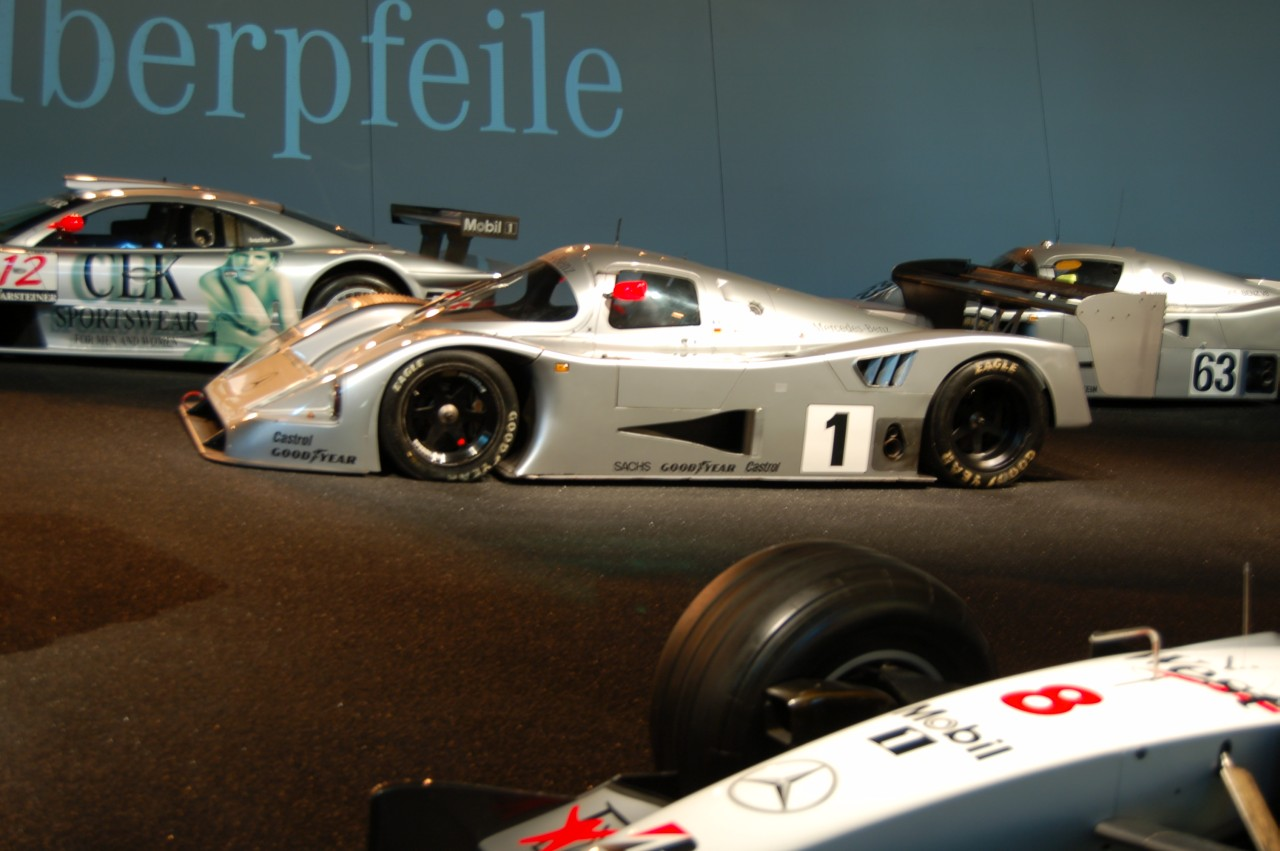 A Mercedes-Benz C11